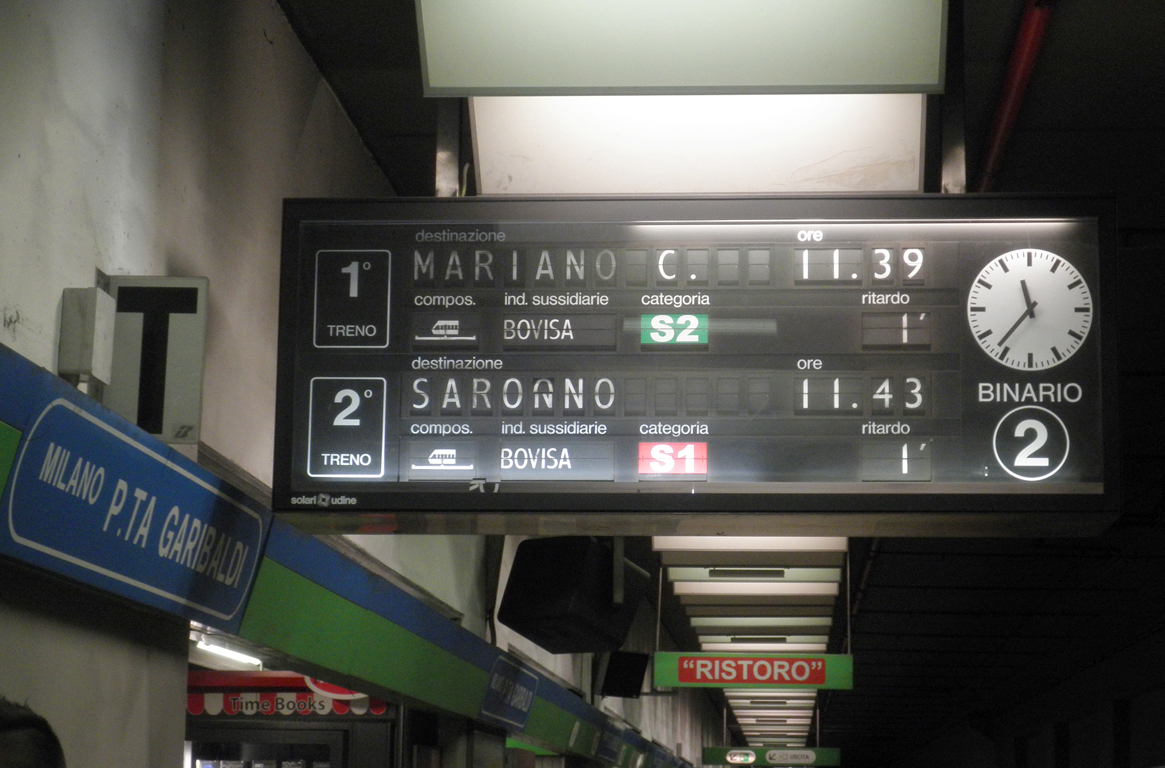 Tabellone alla stazione ferroviaria di Milano Porta Garibaldi passante